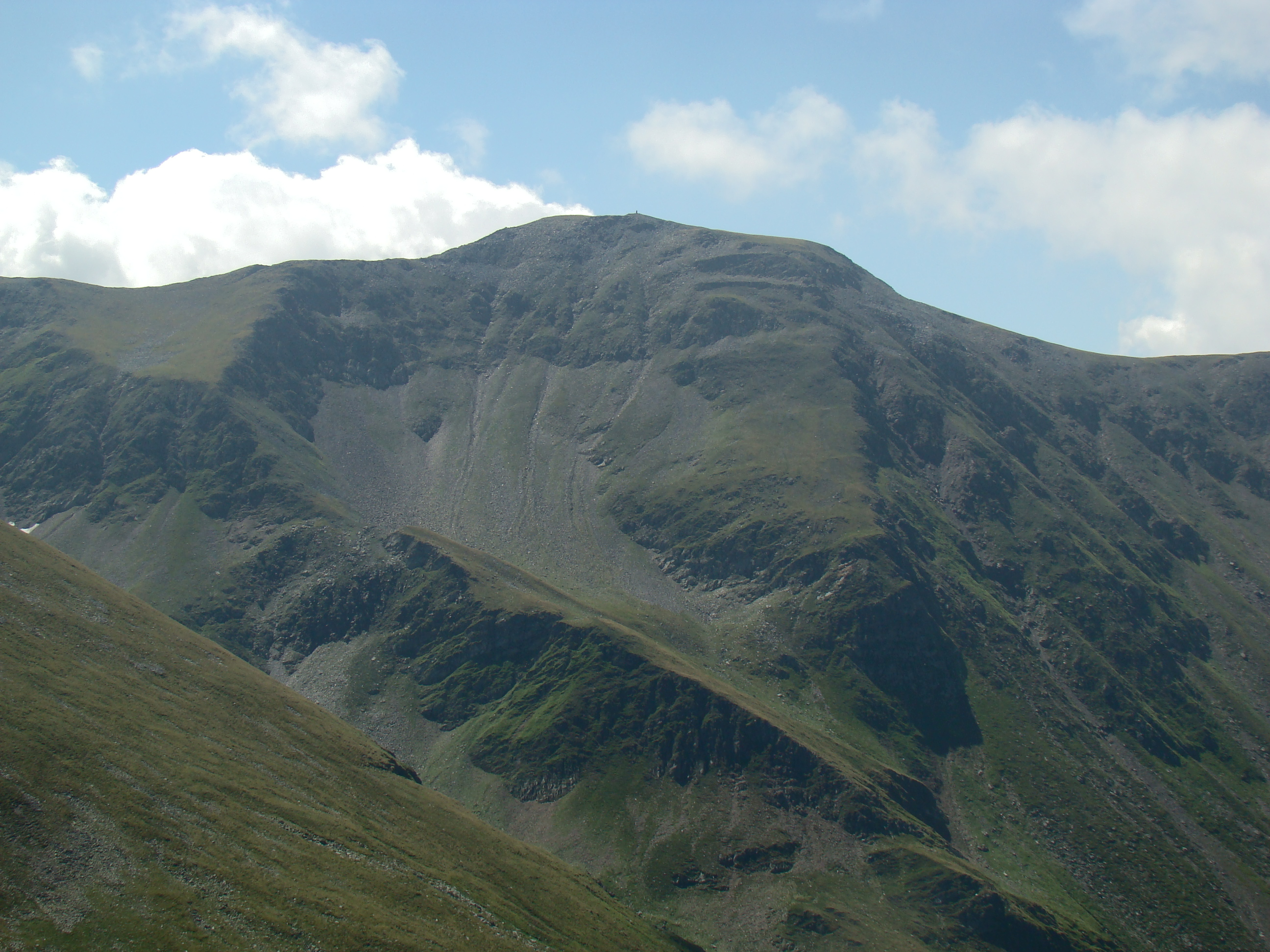 Munţii Făgăraş (vedere spre Vârful Dara)